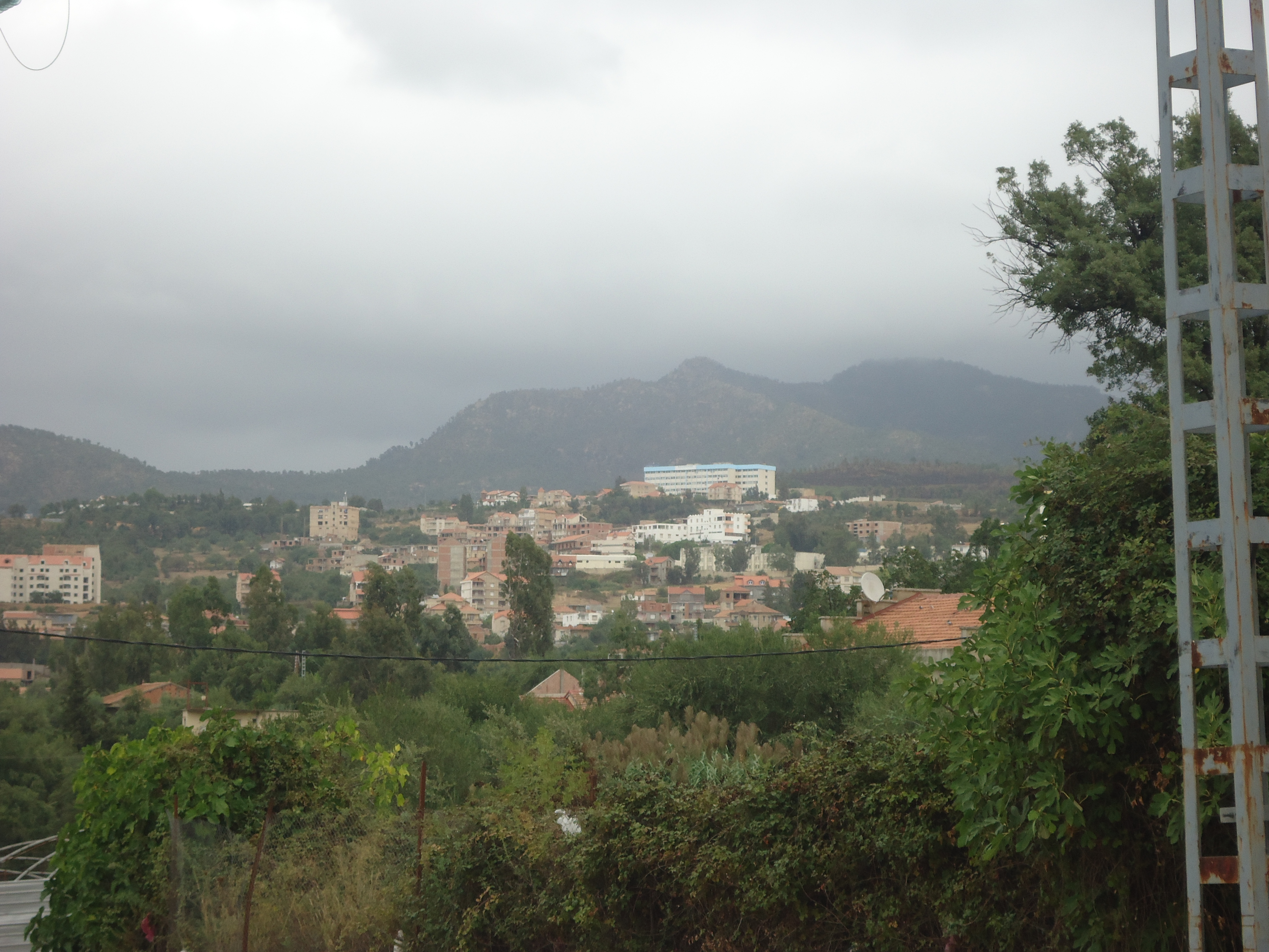 Taqbaylit: Hôpital Azazga